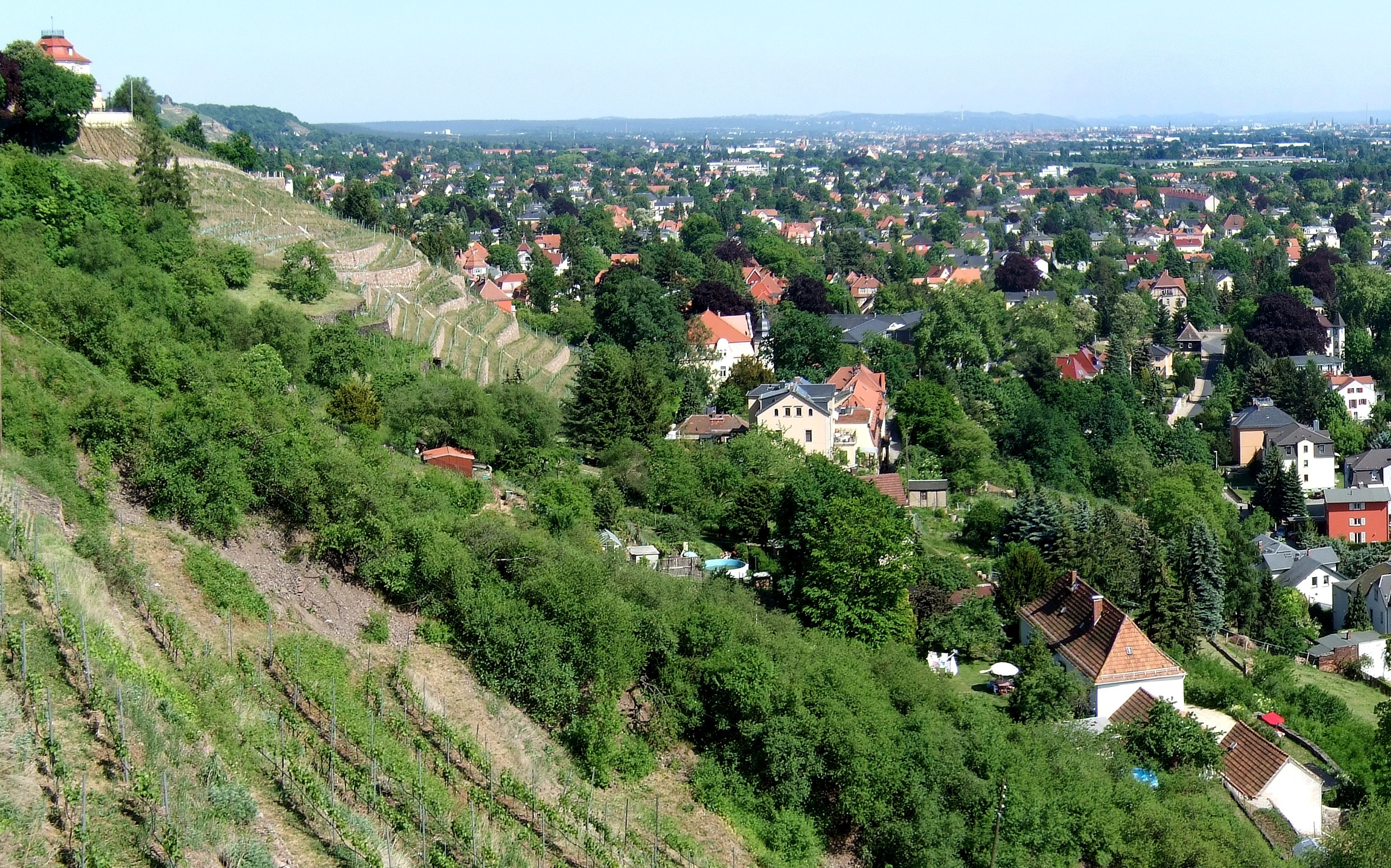 Ausschnitt aus dem Bild mit Neufriedstein